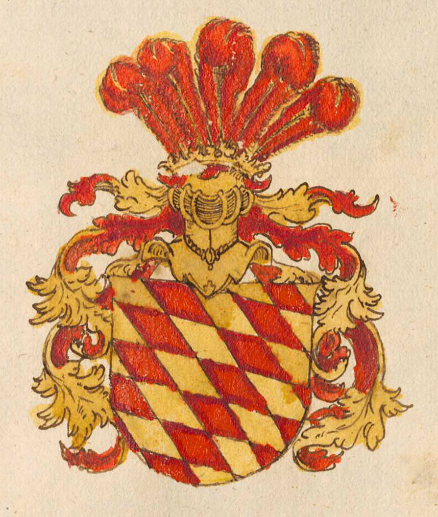 Wappen Königsegg (?)